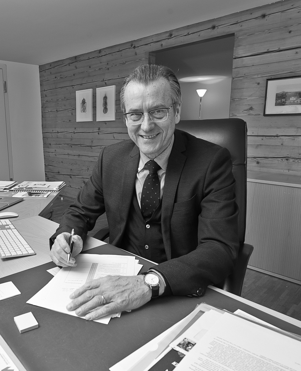 Willi Eugster an seinem Arbeitsplatz im Rektorat der Kantonsschule Trogen (S/W-Ausschnitt)